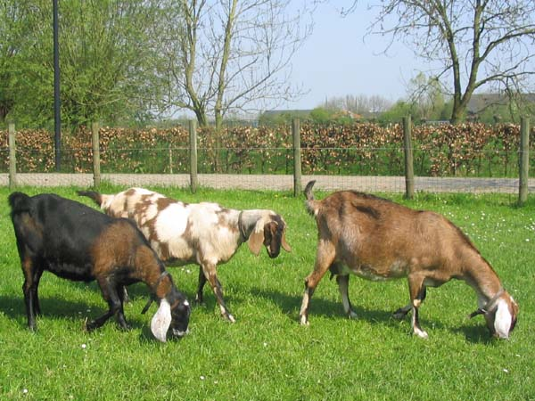 Nubische geiten categorie:afbeelding geit